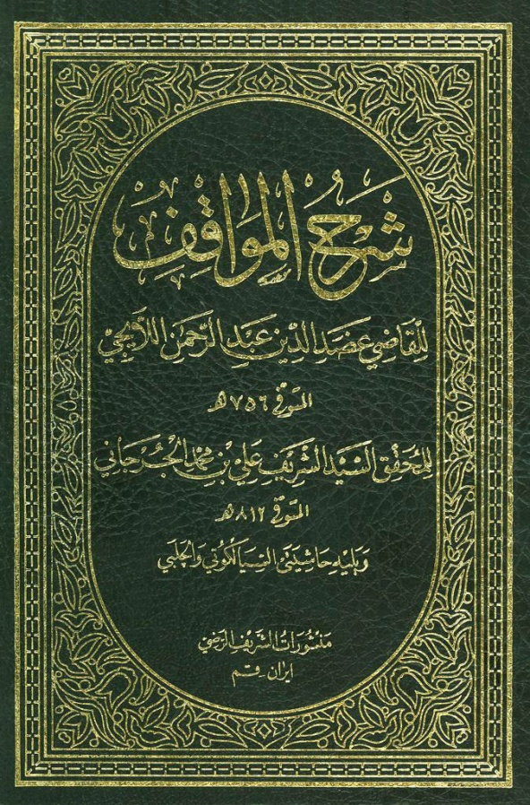 المواقف